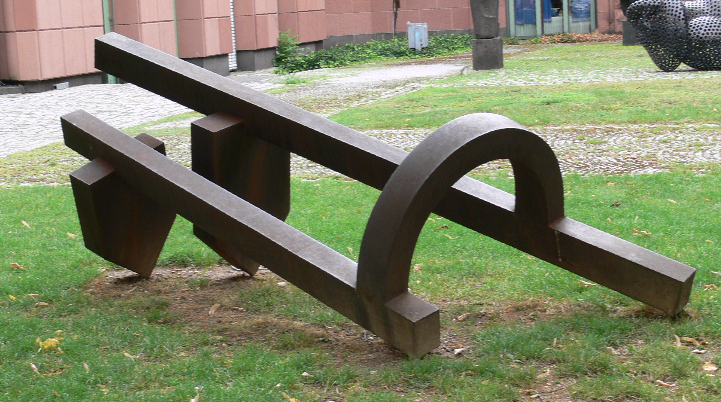 Kunsthalle Mannheim, Skulpturengarten Werner Pokorny: Ohne Titel (Pflug), 1988, Cor-Ten-Stahl